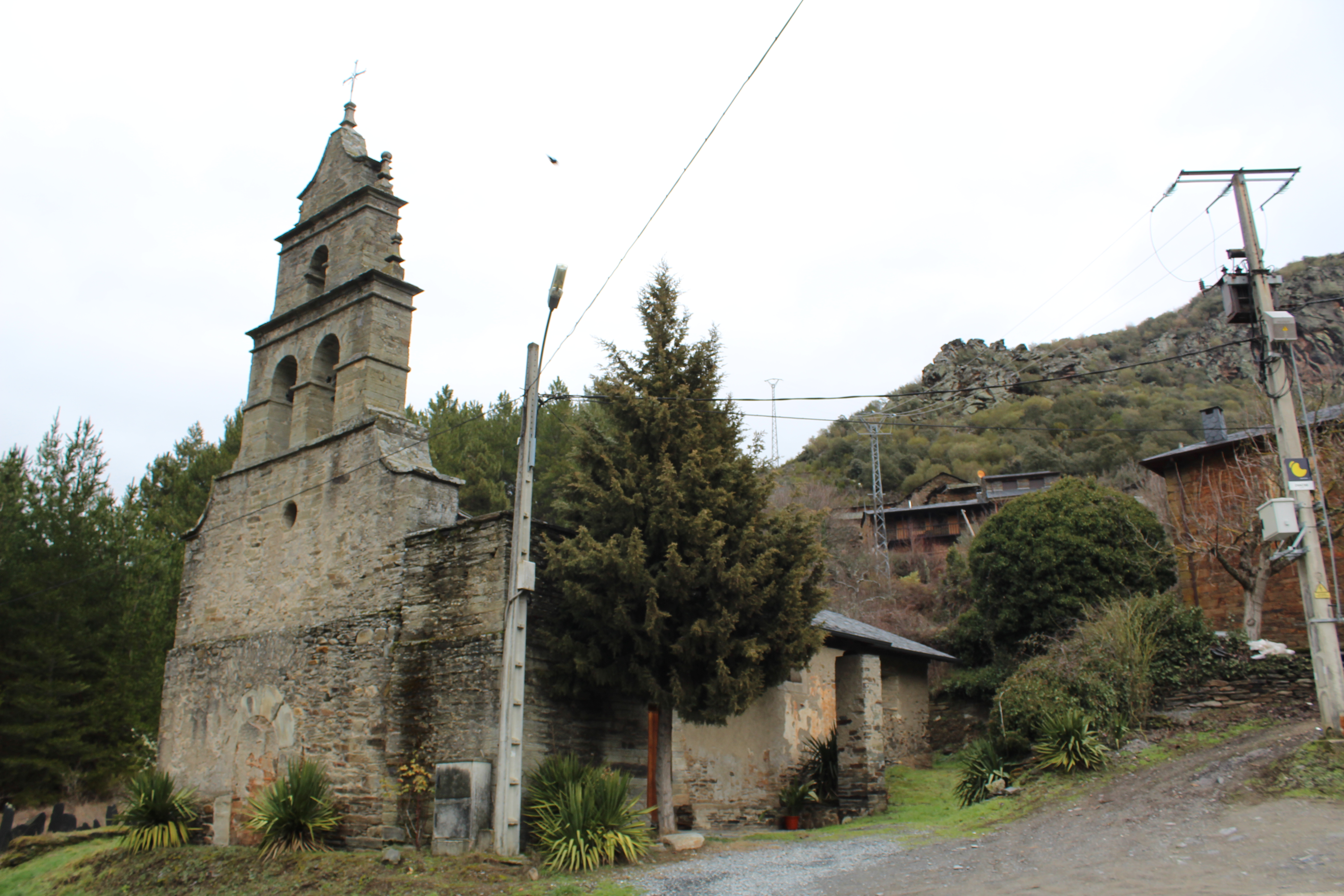 Iglesia de Espanillo, pedanía de Arganza.